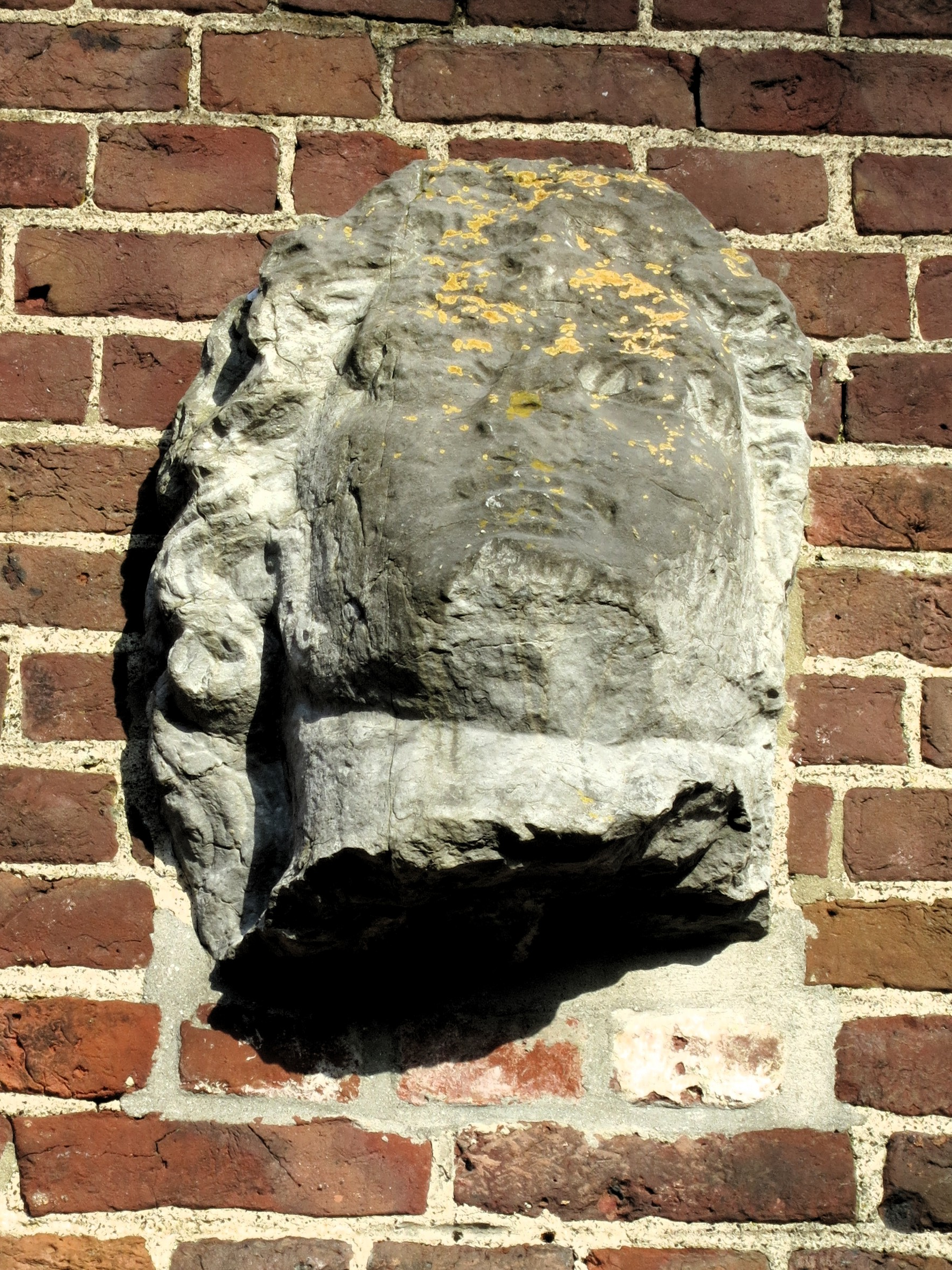 Beeld in de voorgevel van de Kerkhofkapel in Guigoven, afkomstig uit de vroegere, afgebroken parochiekerk. Mogelijk is de een kop van oude godheid (mogelijk Apollo) van Romeinse origine.